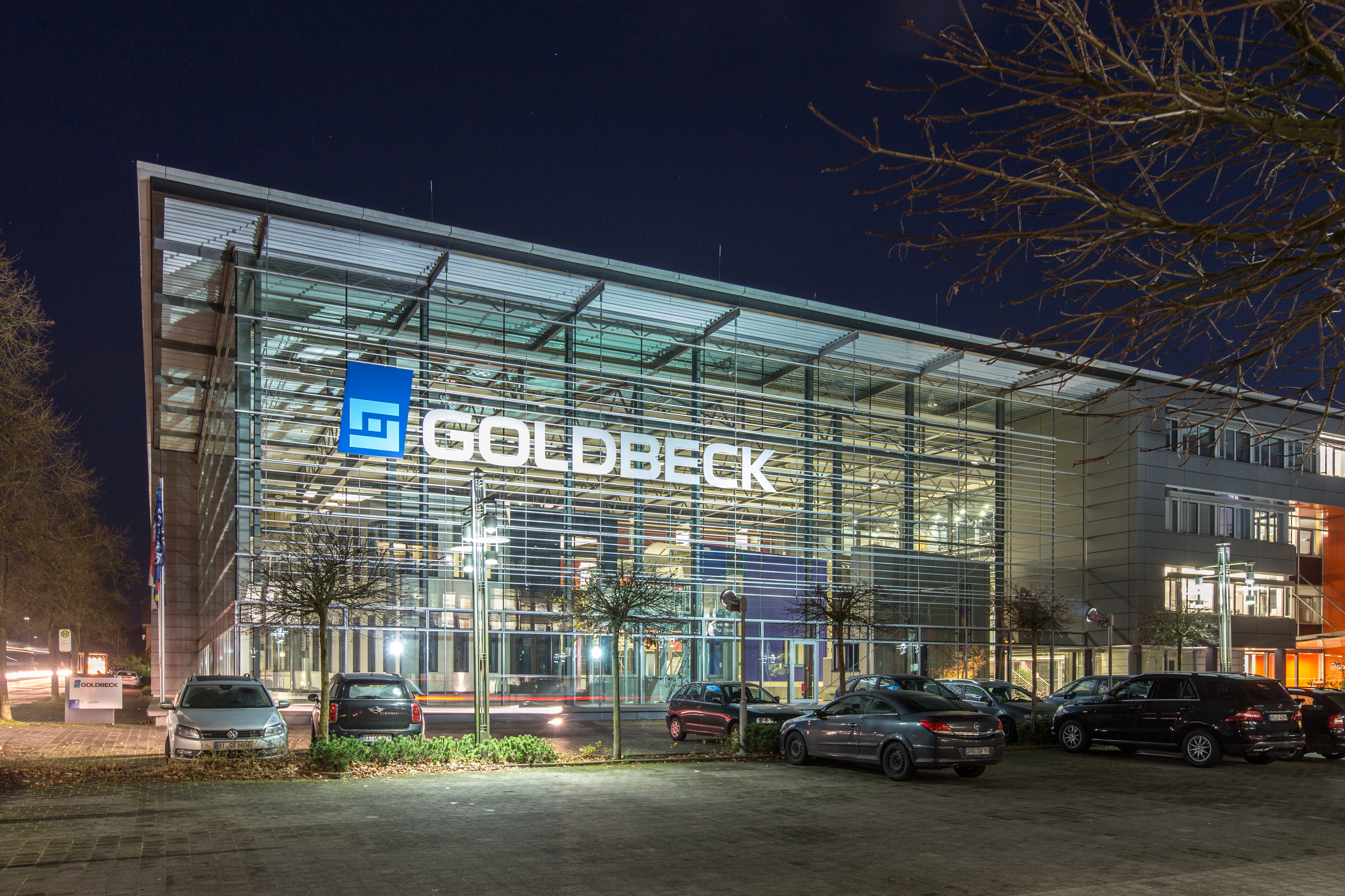 Zentrale Bielefeld